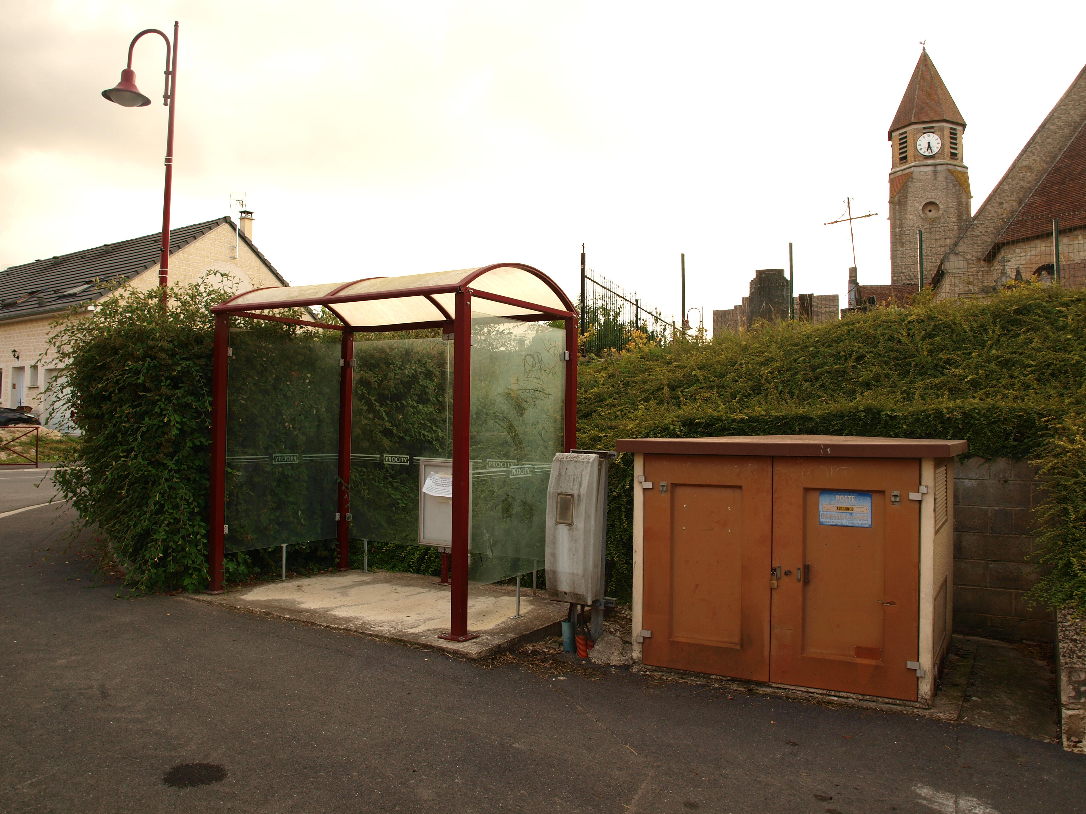 Aussonce (Ardennes, France) ; abribus & transformateur électrique.